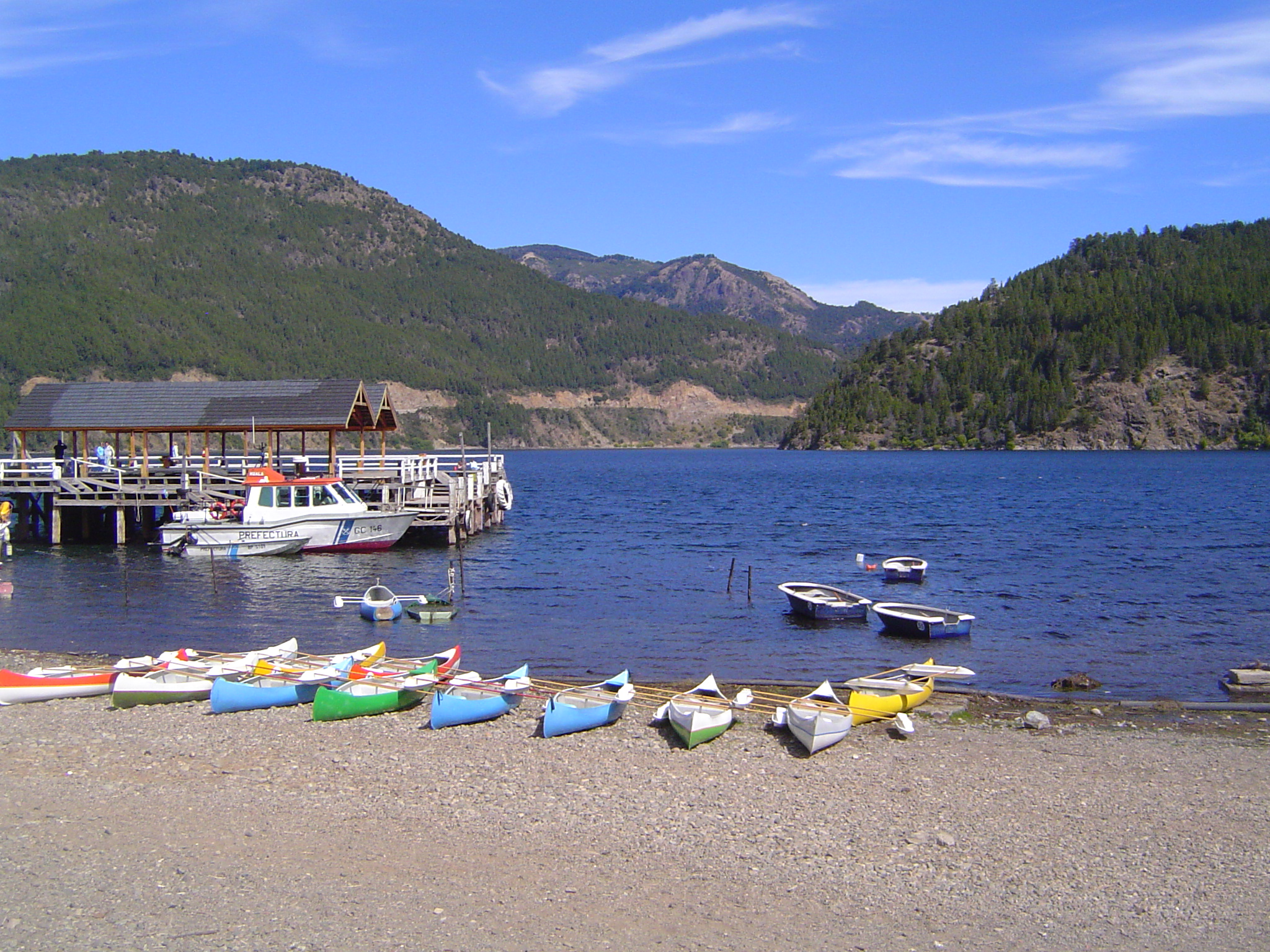 Costa del Lago Lacar, San Martín de los Andes